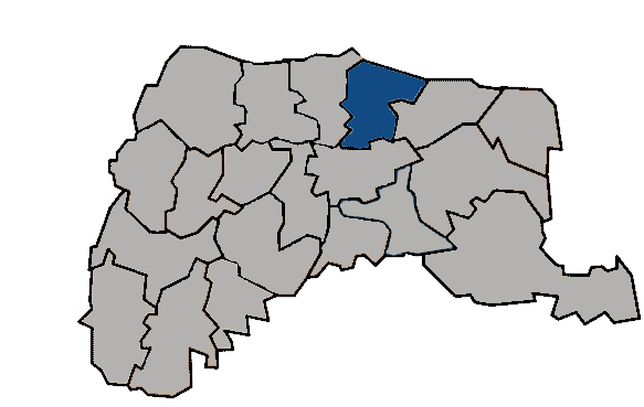 台灣省雲林縣西螺鎮 KaurJmeb於2005年1月28日為編輯zh:西螺鎮所繪製